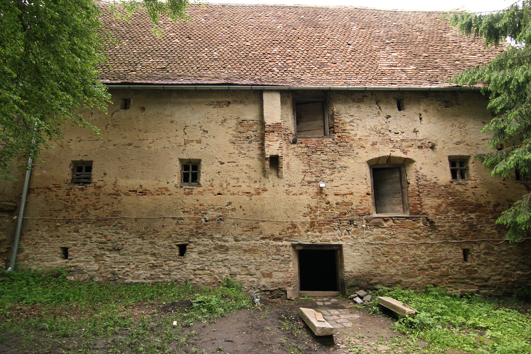 Dealu Frumos: Incintă fortificată, cu turnuri, acces fortificat, încăperi pentru provizii, anexe. 02